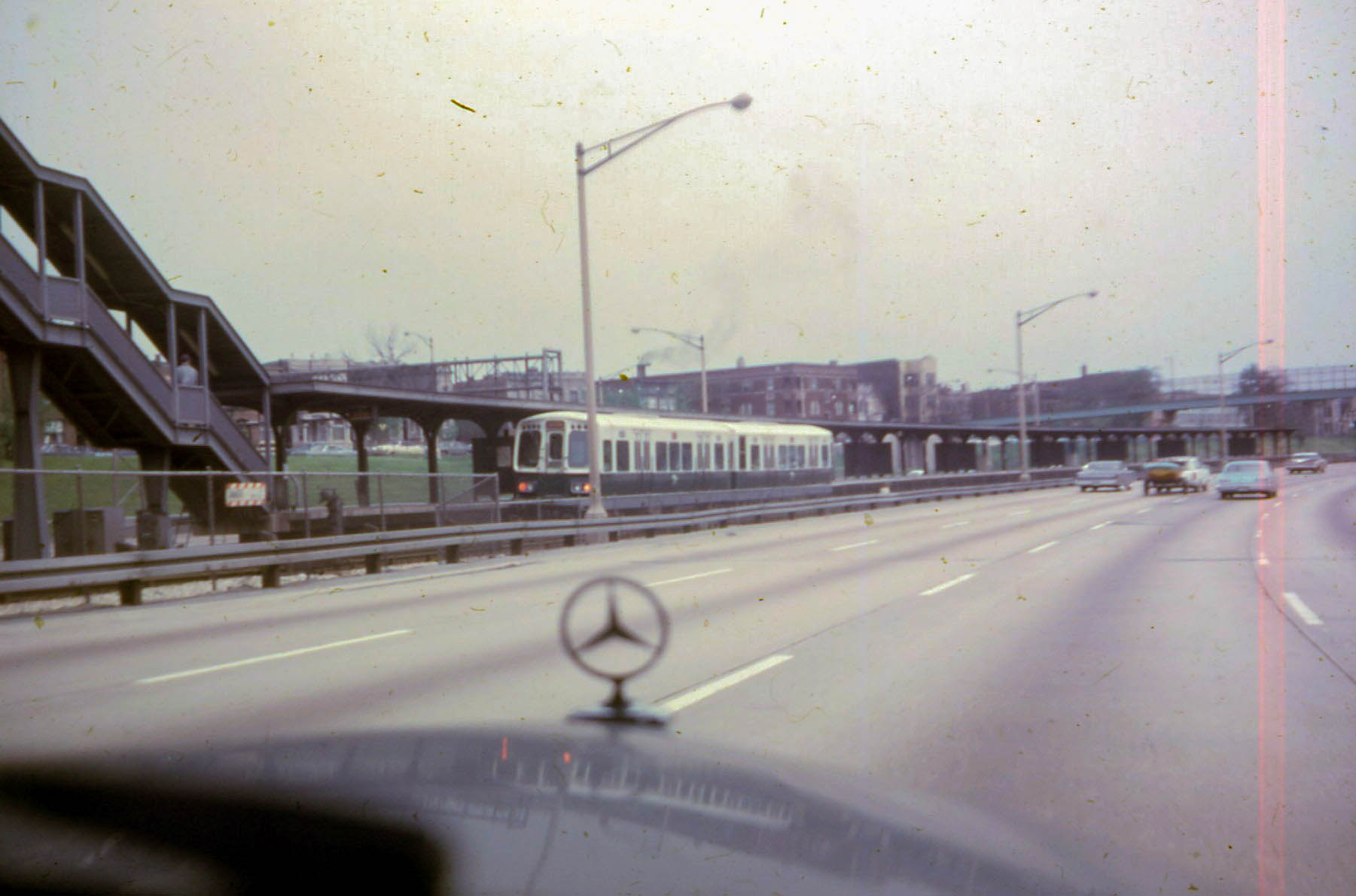 19670600 01 CTA Congress L @ Kostner Ave